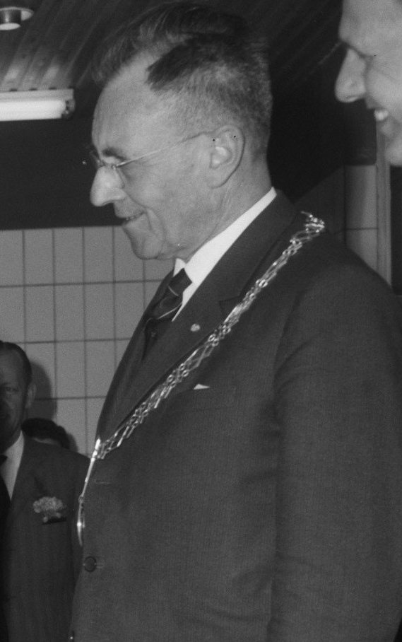 Collectie / Archief : Fotocollectie Anefo Reportage / Serie : [ onbekend ] Beschrijving : Zijne Koninklijke Hoogheid Prins Bernhard , winkelcentrum "Crabbenhof" te Dordrecht geopend, de Prins zoekt zijn artikelen Datum : 24 april 1964 Locatie : Dordrecht Trefwoorden : koninklijk huis, openingen, prinsen, winkelcentra Persoonsnaam : Bernhard, prins Instellingsnaam : Winkelcentrum Crabbenhof Fotograaf : Bilsen, Joop van / Anefo Auteursrechthebbende : Nationaal Archief Materiaalsoort : Negatief (zwart/wit) Nummer archiefinventaris : bekijk toegang 2.24.01.04 Bestanddeelnummer : 916-3483 Reacties Geplaatst door Dordtenaar op 27 oktober 2015 - 17:50. "Crabbehof" is de juiste schrijfwijze. Rechts met ambtsketen staat de burgemeester van Dordrecht J.A.H.J. v.d. Dussen.